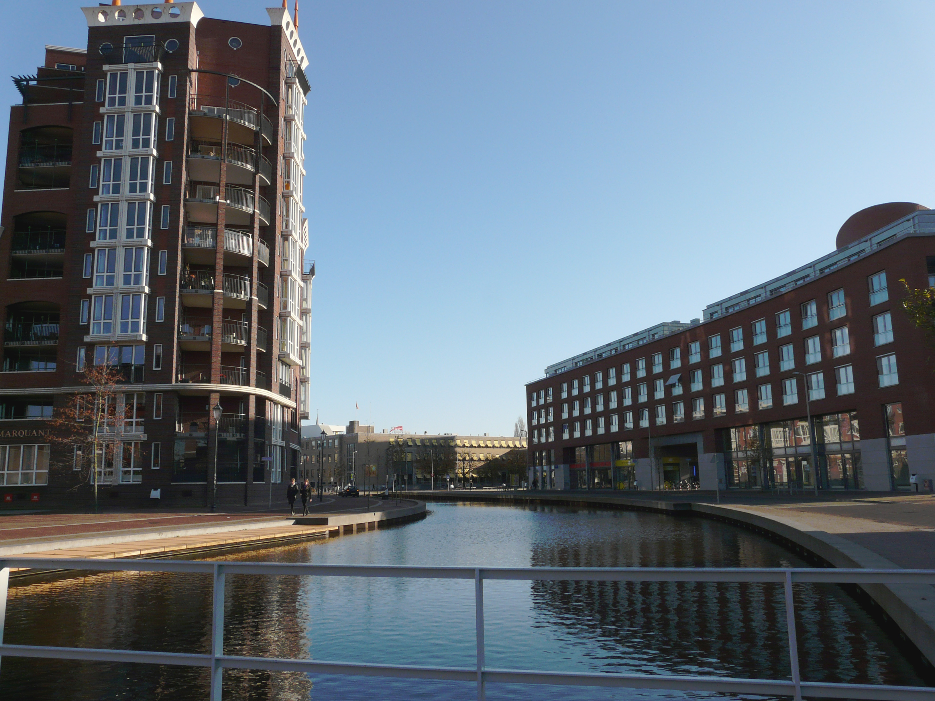 Zicht op een deel van de appartementen De Marquant Breda aan de straat de Nieuweweg, Breda en de straat de Markendaalseweg in Breda. Gelegen nabij het centrum van Breda en niet ver van de haven van Breda.